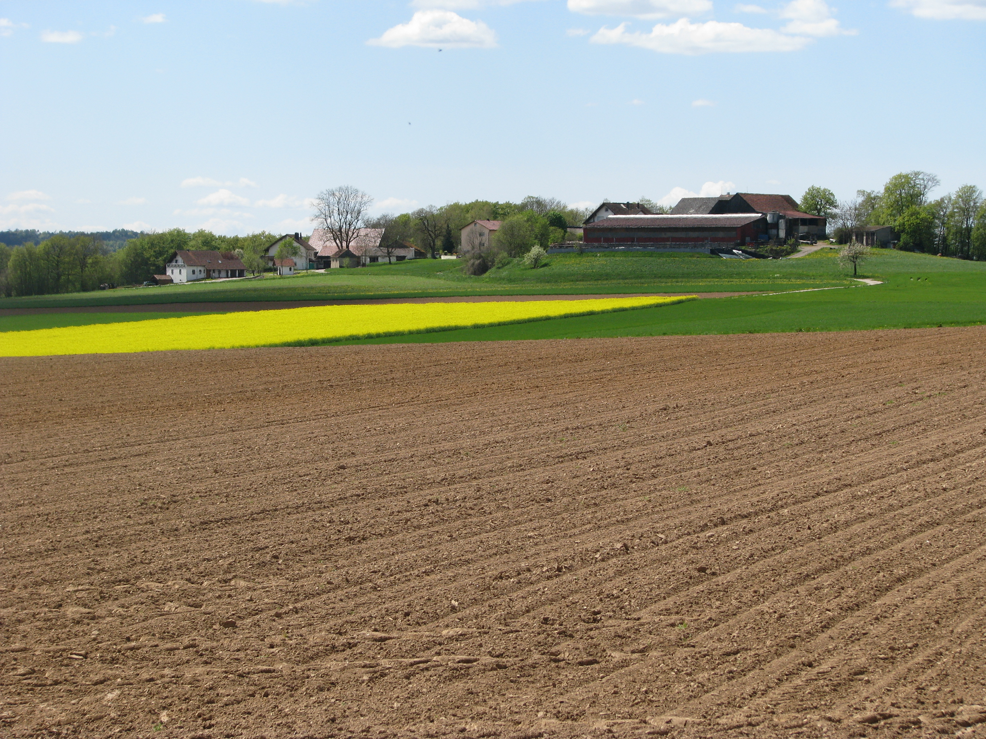 Thannbrunn, Ortsteil von Berching im bayerischen Landkreis Neumarkt in der Oberpfalz, Ortsansicht